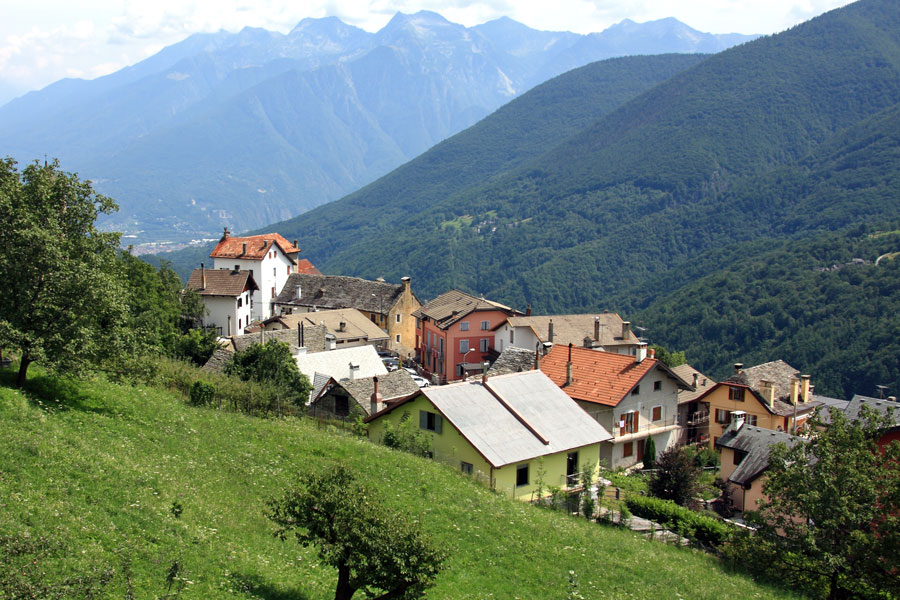 Veduta della frazione-capoluogo San Lorenzo di Bognanco (VB)